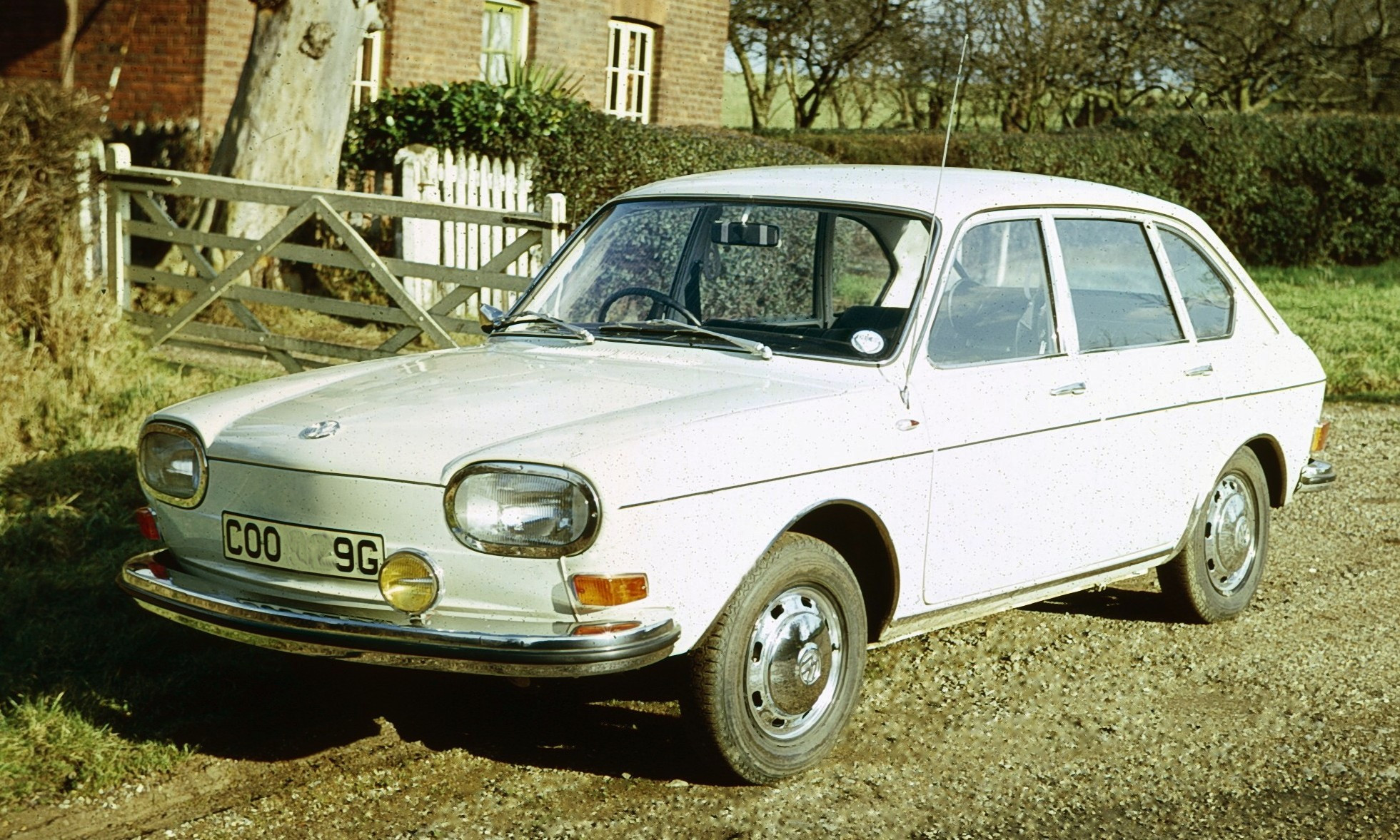 Volkswagen Type 4 early version